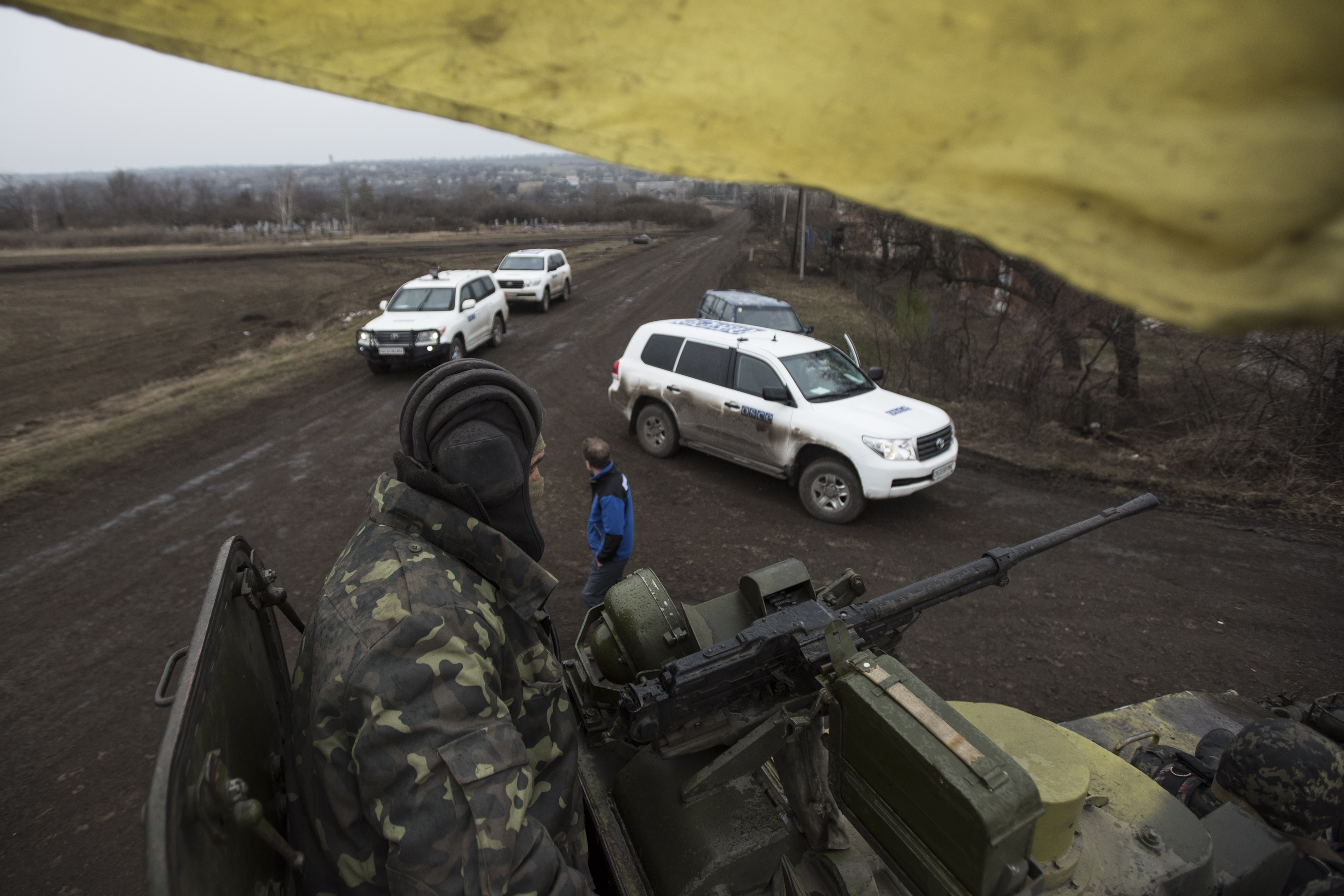 March, 2015